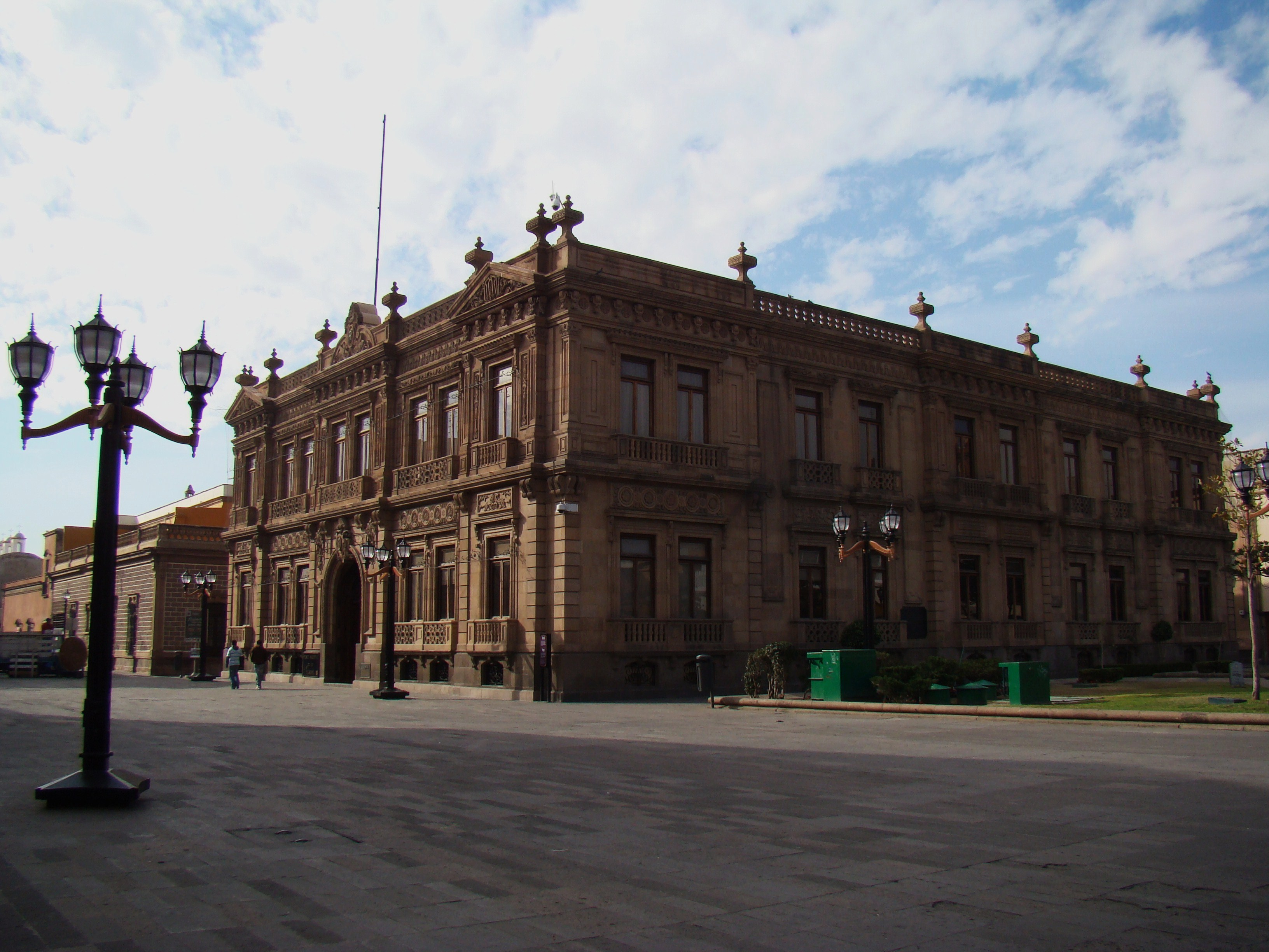 Museo de la mascara desde la plaza del Carmen